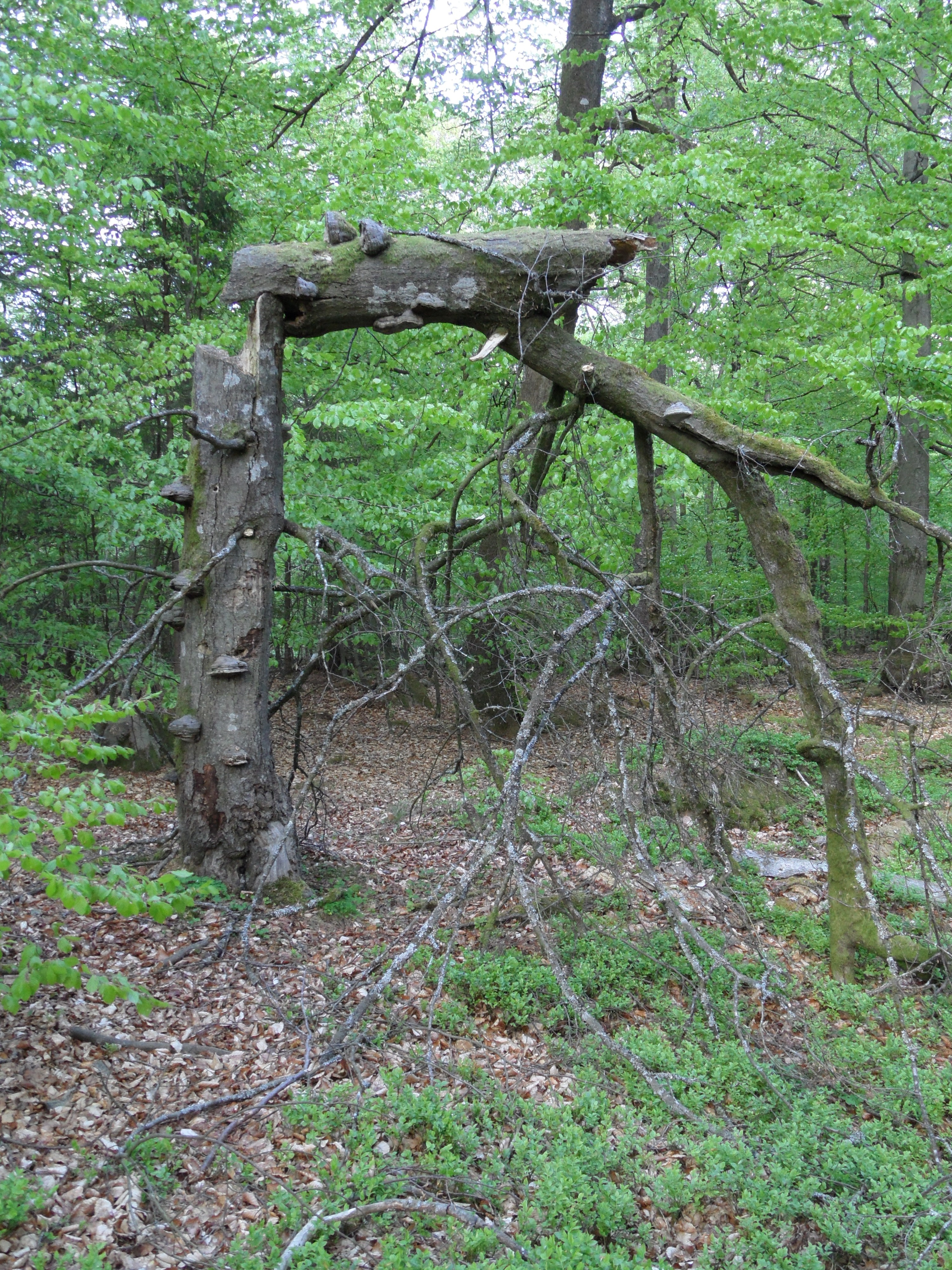 Naturreservat Timan Högstubbe